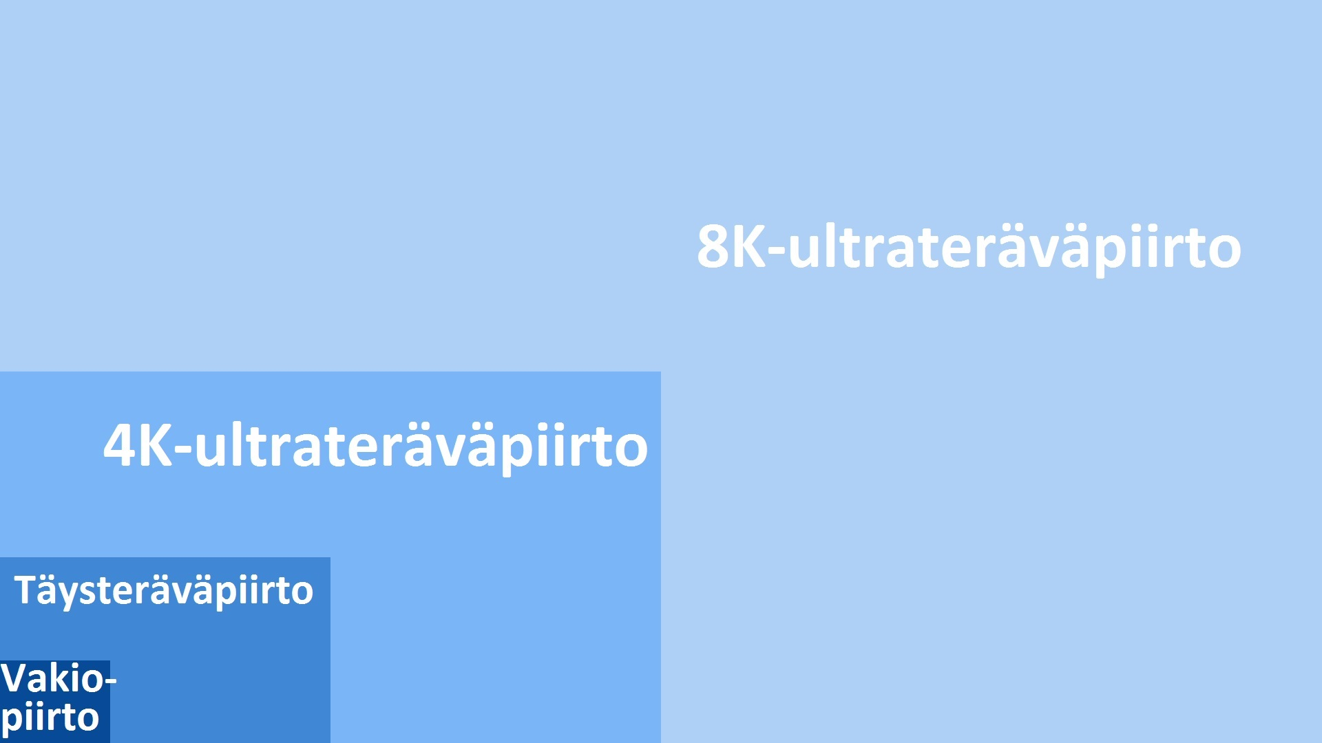 Kuvassa verrataan 8K:n, 4K:n, täysteräväpiirron ja vakiopiirron mittasuhteita.